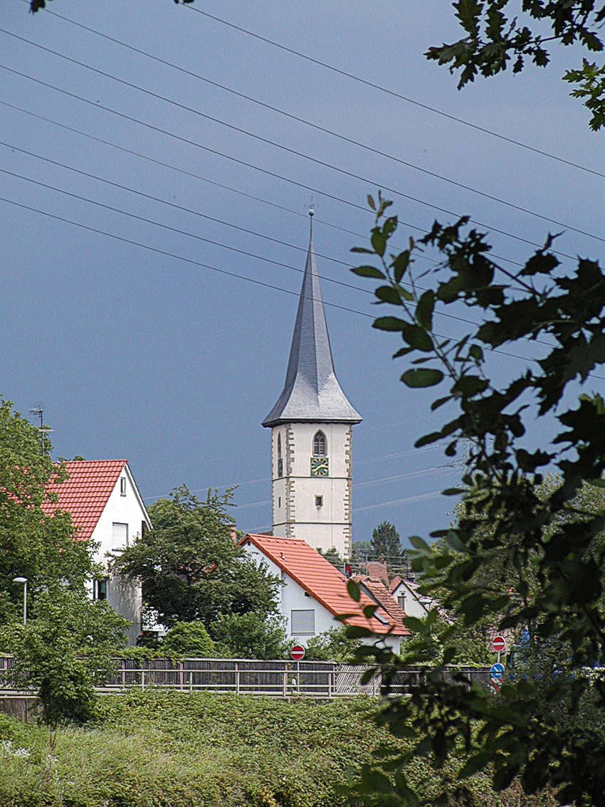 Die Kirche am Neckar in Ludwigsburg Neckarweihingen